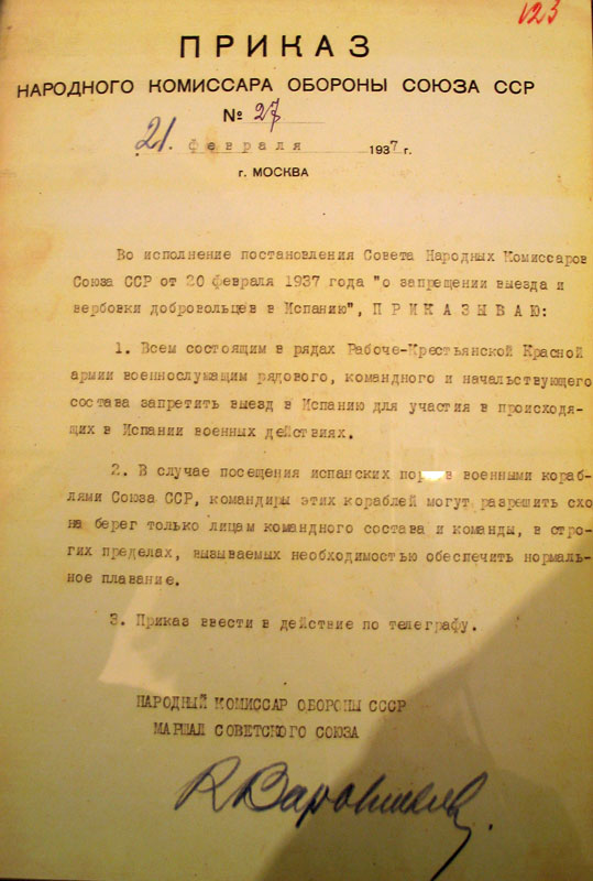 Verordnung des sowjetischen Volkskommissars Woroschilow über des Verbot der Ausreise von Sowjetbürgern nach Spanien und der Werbung Freiwilliger für den Kampf in Spanien